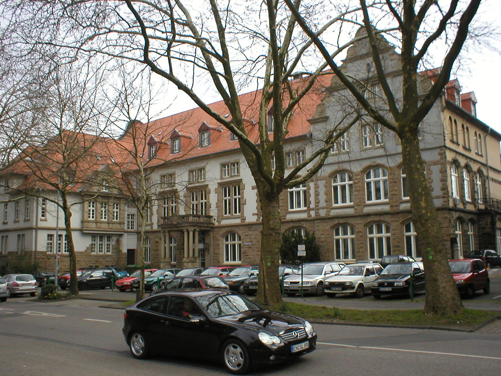 Universität Witten im ehemaligen Amtshaus der bis 1929 selbstständigen Gemeinde Annen This is a photograph of an architectural monument.